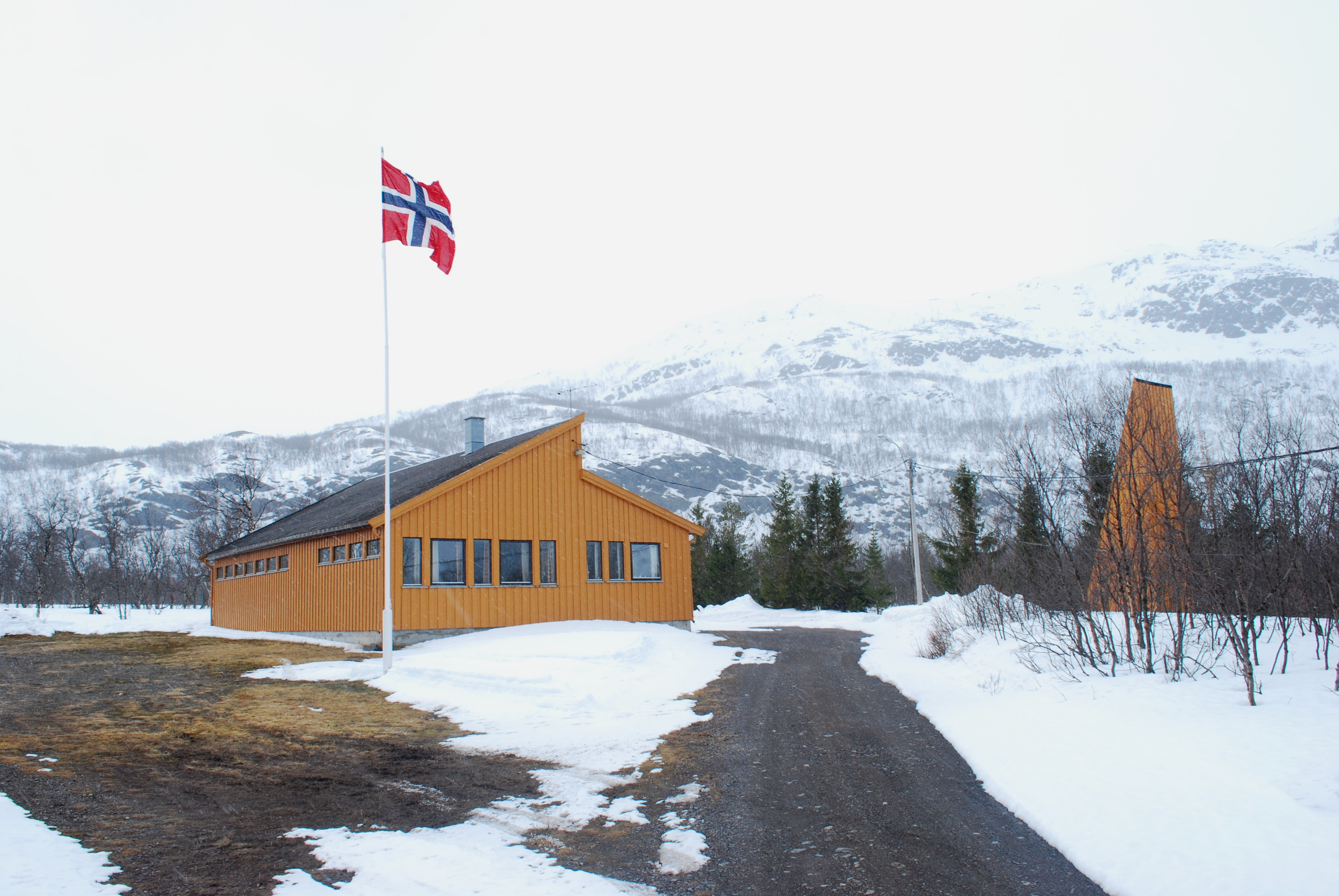 Vestertana kapell, Tana kommune, Finnmark